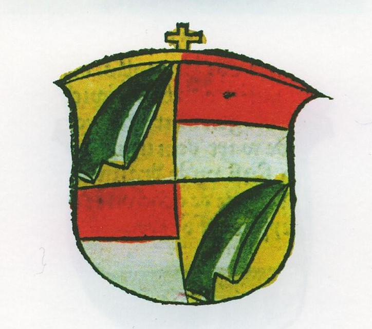 Wappen des Erzbischoffs Ludolf von Kroppenstedt. Das Wappen vereinigt das erzstiftische Wappen (rot-weiß) und das Familienbild Ludolfs .